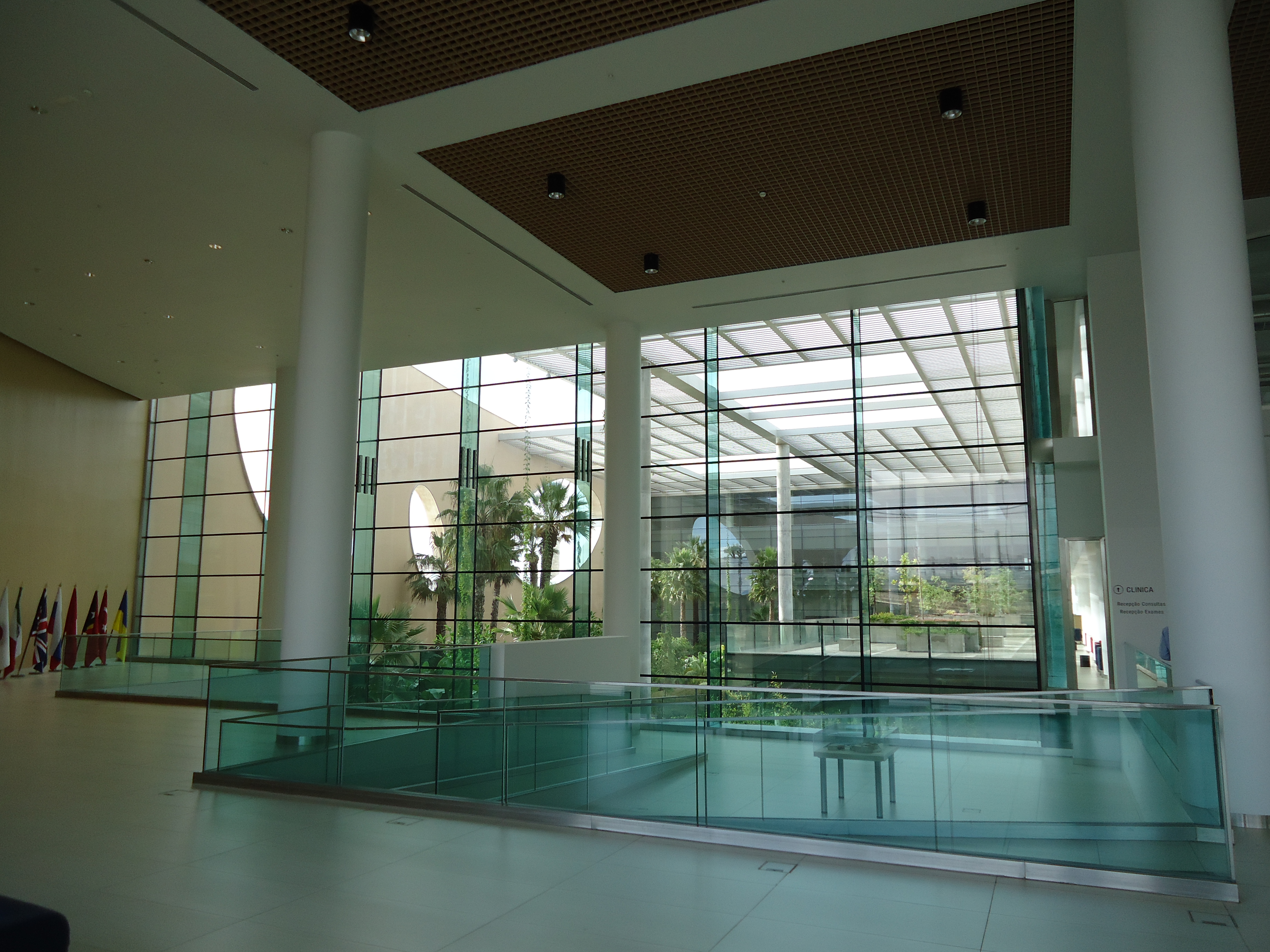 Champalimaud Centre for the Unknown, Lisboa, Portugal: edifício principal (vista do hall).